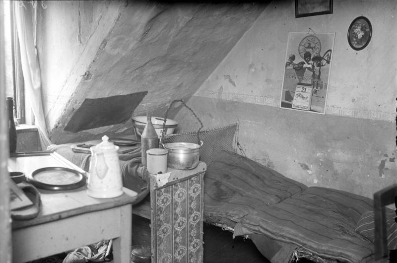 Zu dem großen Prozess den siebenundzwanzigfachen Mörder Haarmann in Hannover, wozu hundertundneunzig Zeugen geladen sind. Die Mansardenstube, die Wohnung Haarmanns in welcher er seine Opfer umbrachte.